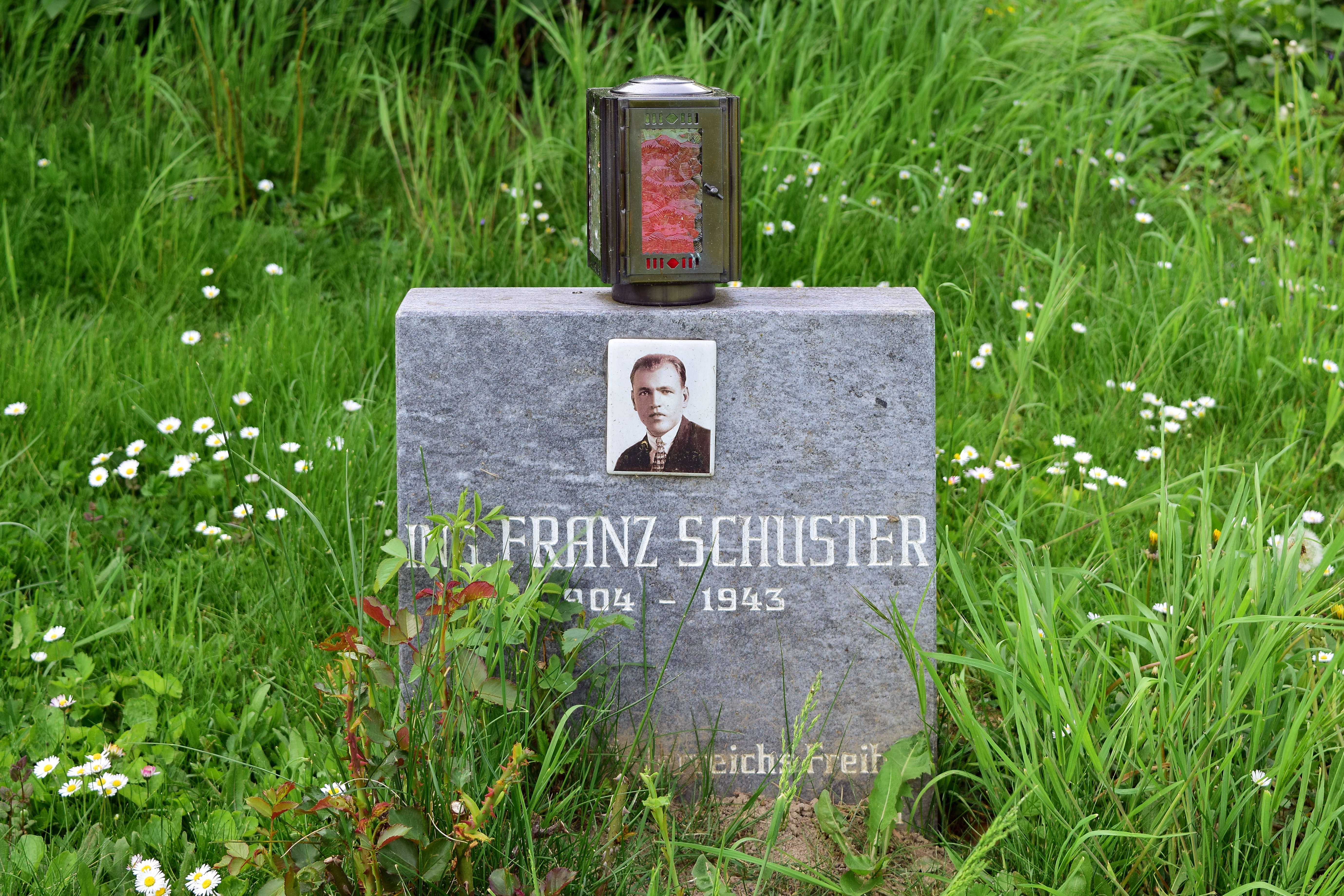 Gesamtanlage, Zentralfriedhof